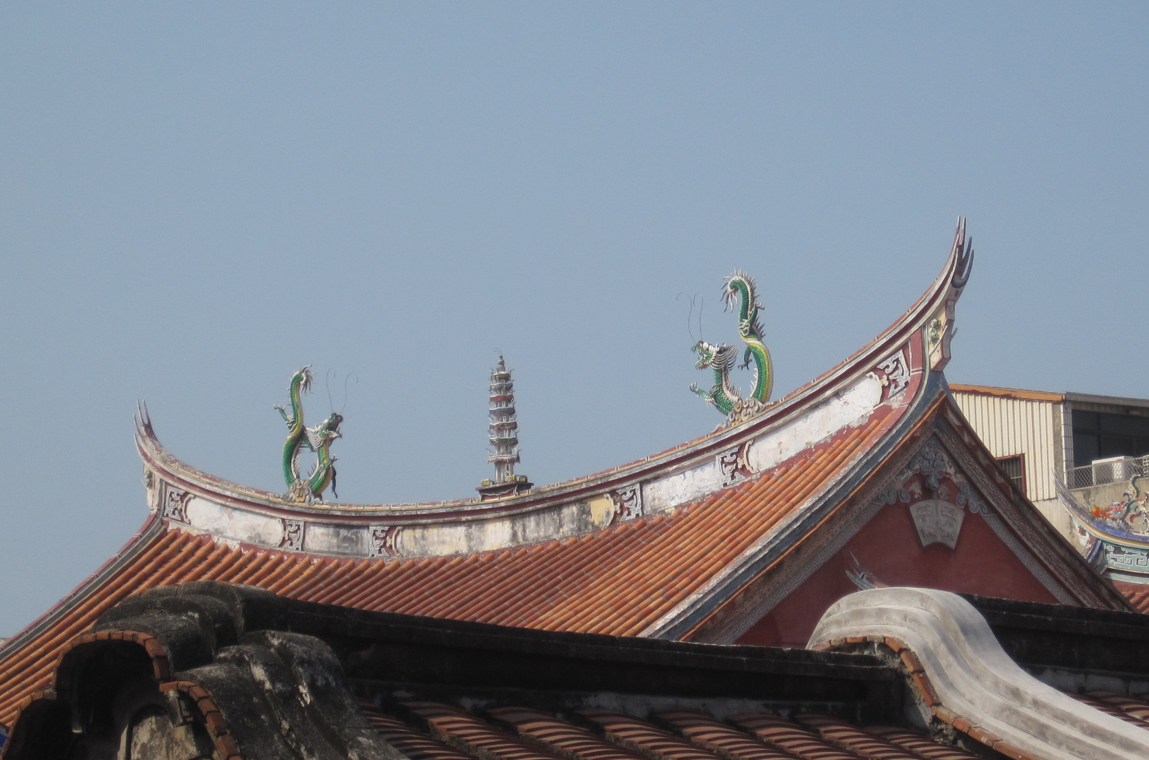 大天后宮正殿屋頂；自祀典武廟拍攝